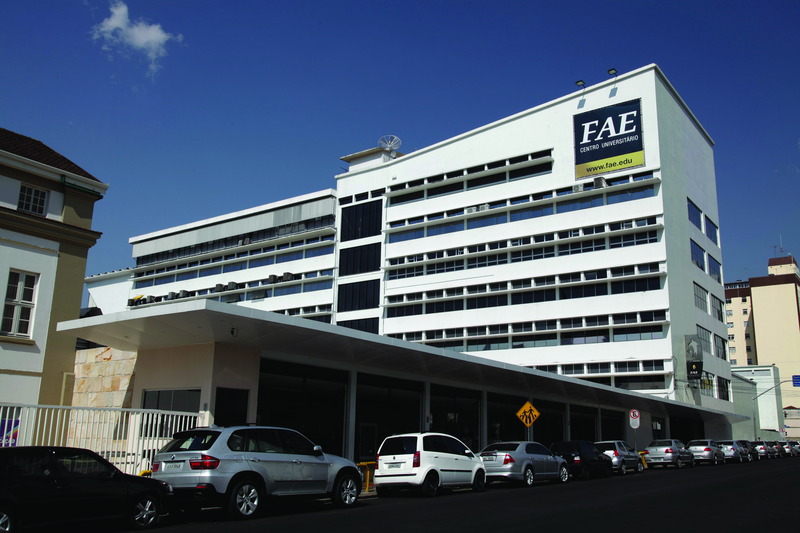 Prédio da FAE Centro Universitário em Curitiba - PR.